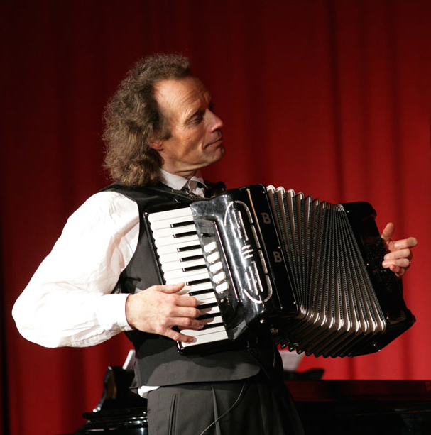 Aufgenommen in Heidelberg um 2007